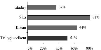 mnoztví textu o kafírech v sunně a koránu